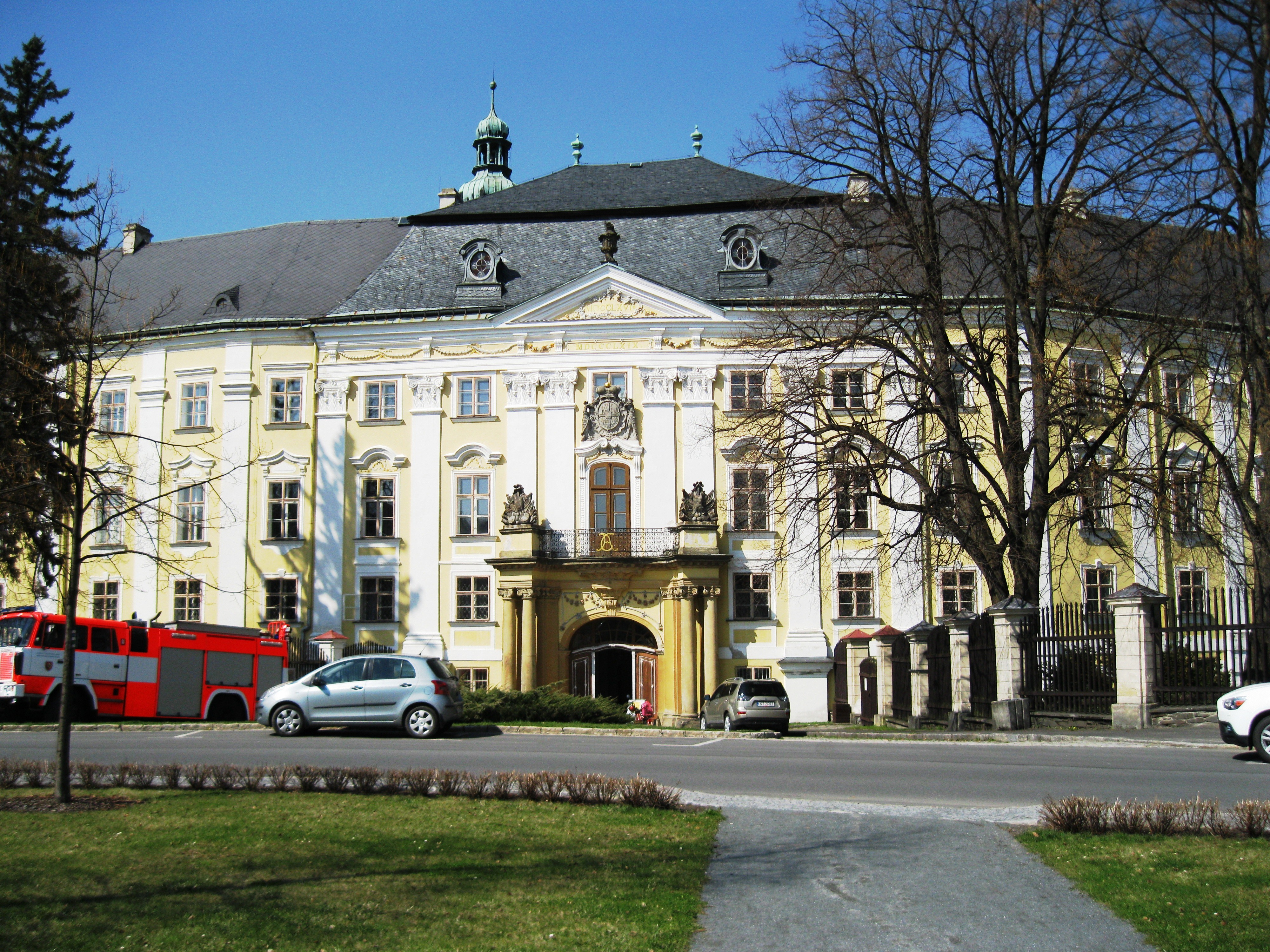 Zámek Bruntál, nám. Zámecké 1, Bruntál